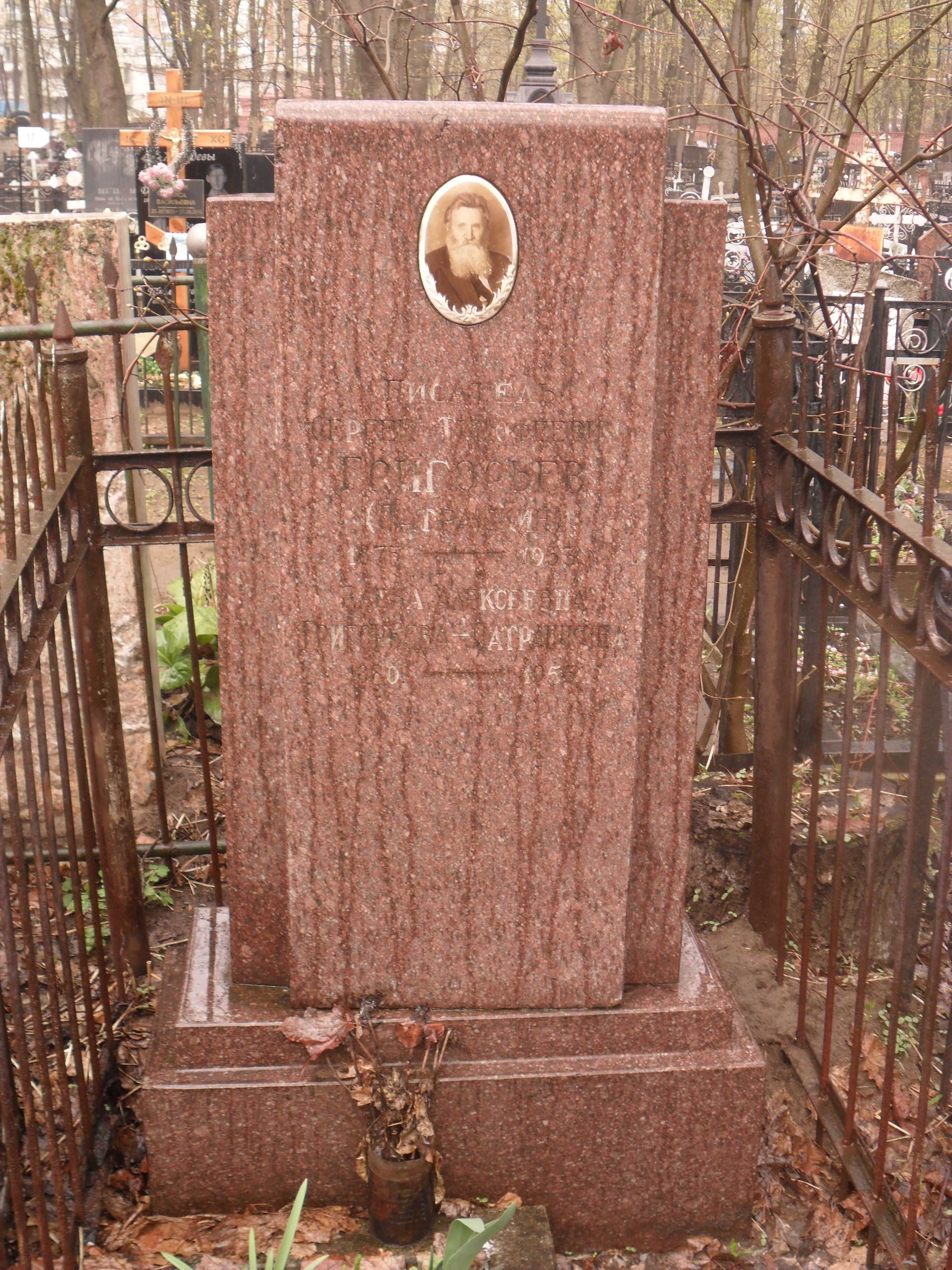 Могила писателя Сергея Григорьева на Ваганьковском кладбище.